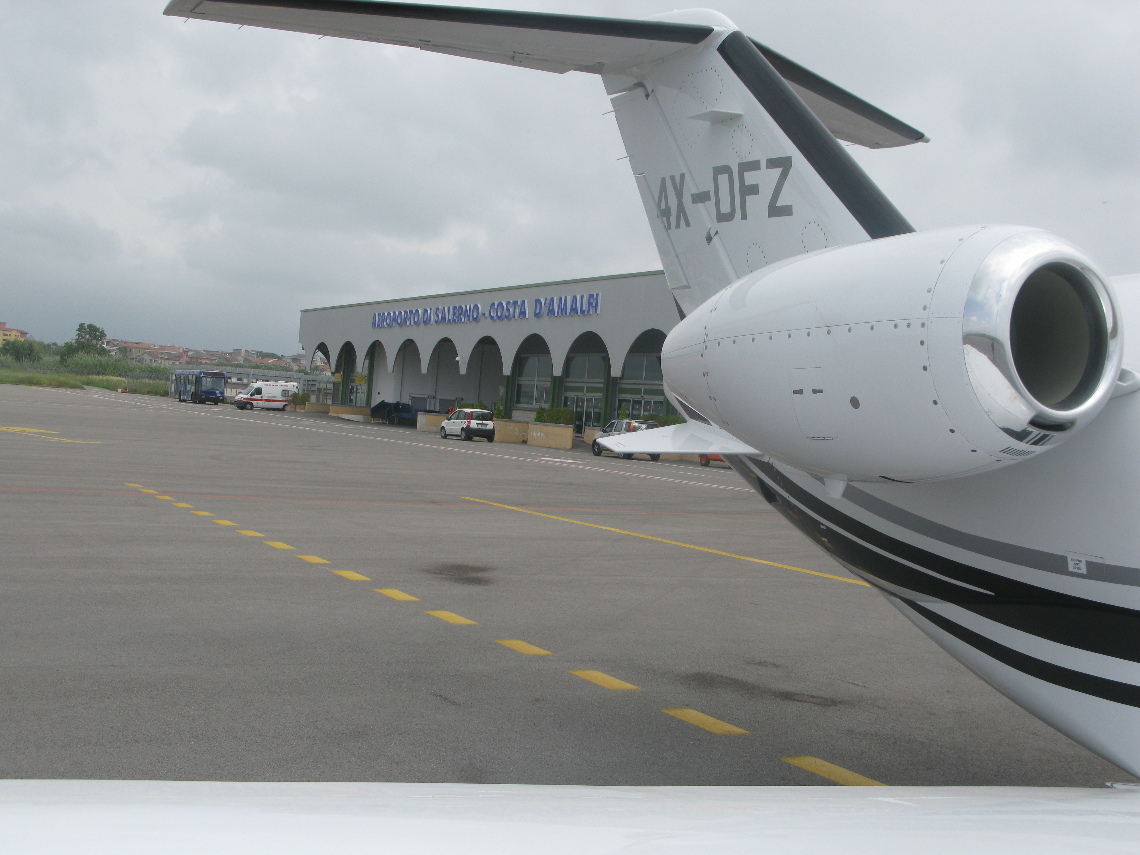 At Salerno Costa d'Amalfi Airport